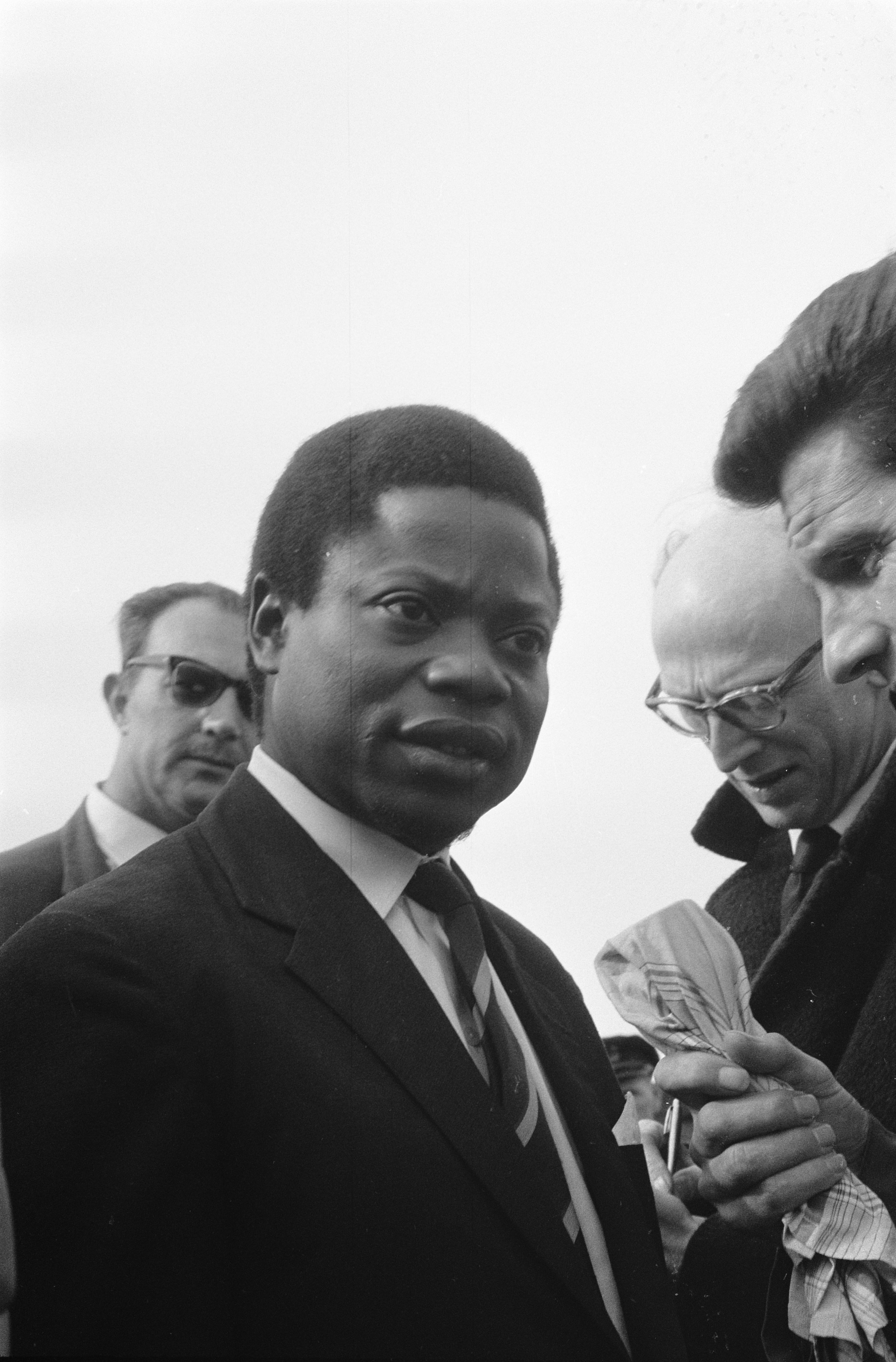 Collectie / Archief : Fotocollectie Anefo Reportage / Serie : [ onbekend ] Beschrijving : Aankomst op Schiphol van Justin Bomboko minister in reg. Ileo op doorreis naar Parijs Datum : 30 september 1960 Locatie : Noord-Holland, Schiphol Trefwoorden : aankomsten, ministers Persoonsnaam : Justin Bomboko Fotograaf : Gelderen, Hugo van / Anefo Auteursrechthebbende : Nationaal Archief Materiaalsoort : Negatief (zwart/wit) Nummer archiefinventaris : bekijk toegang 2.24.01.05 Bestanddeelnummer : 911-6367